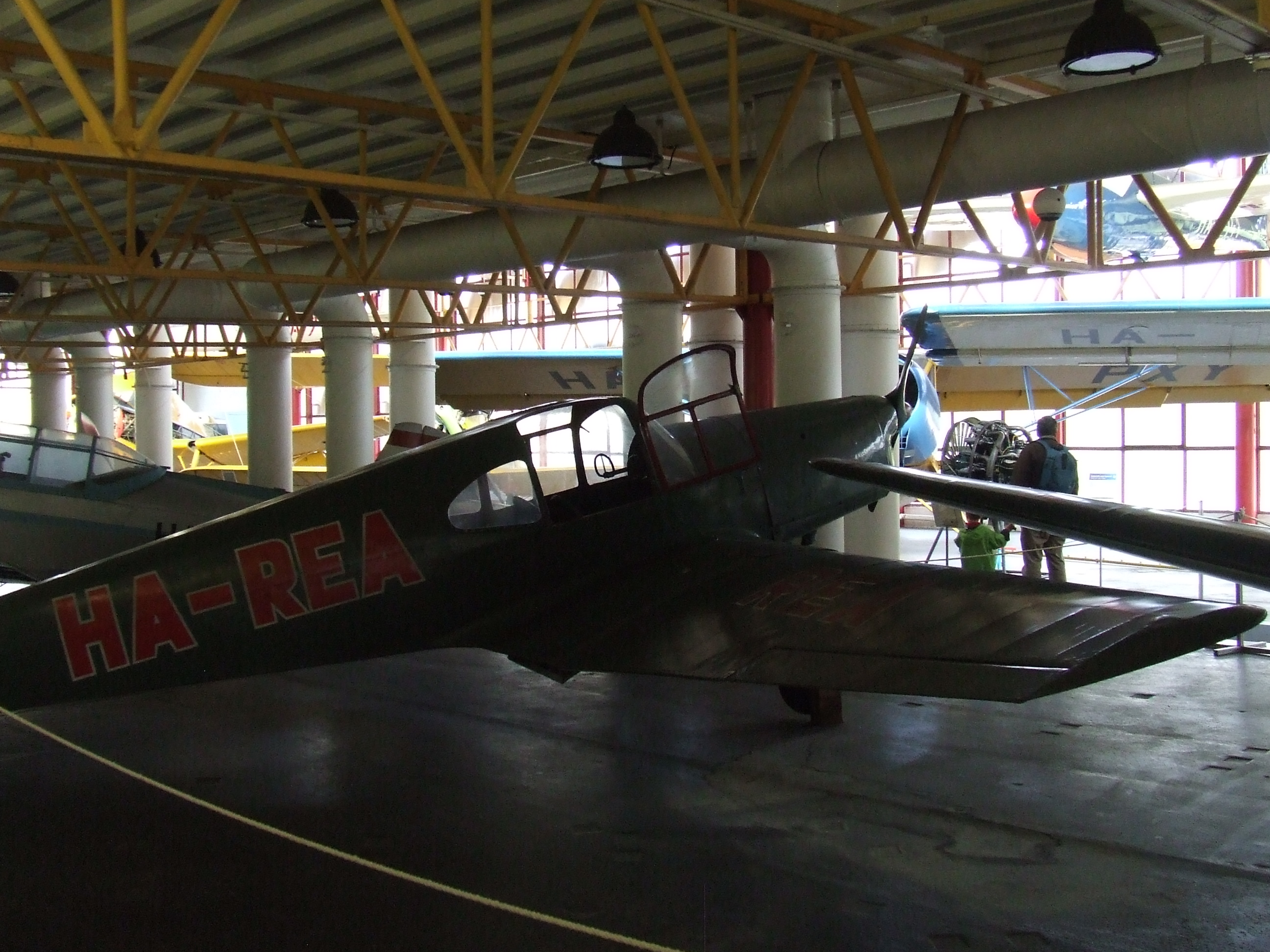 Petőfi Csarnok, Repüléstörténeti kiállítás, Mráz M-1C Sokol